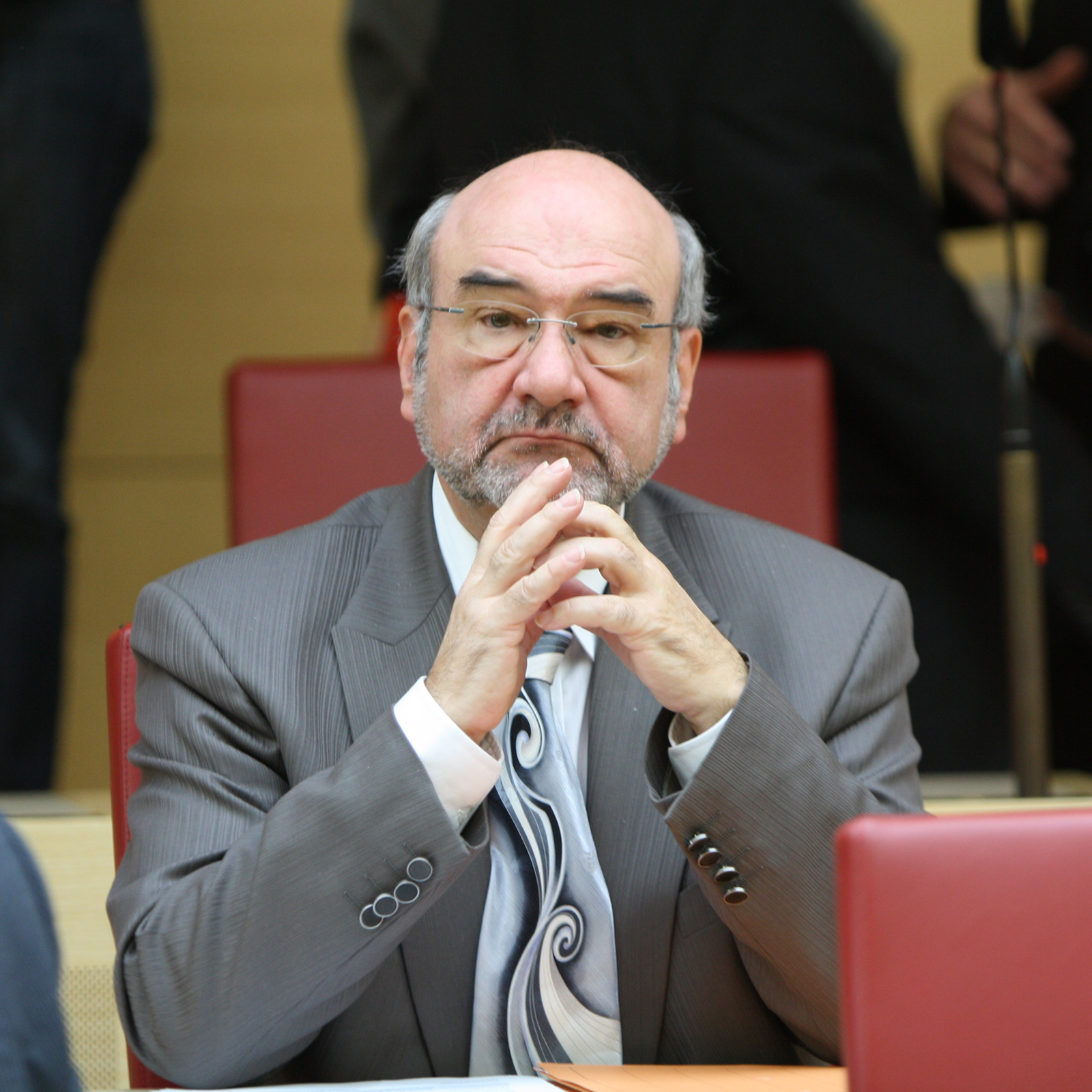 Peter Bauer, deutscher Kommunal- und Landespolitiker (Freie Wähler) - seit 2008 gehört er als Abgeordneter dem Bayerischen Landtag an. Hier während einer Plenar-Sitzung im Bayerischen Landtag am 09.11.2011.